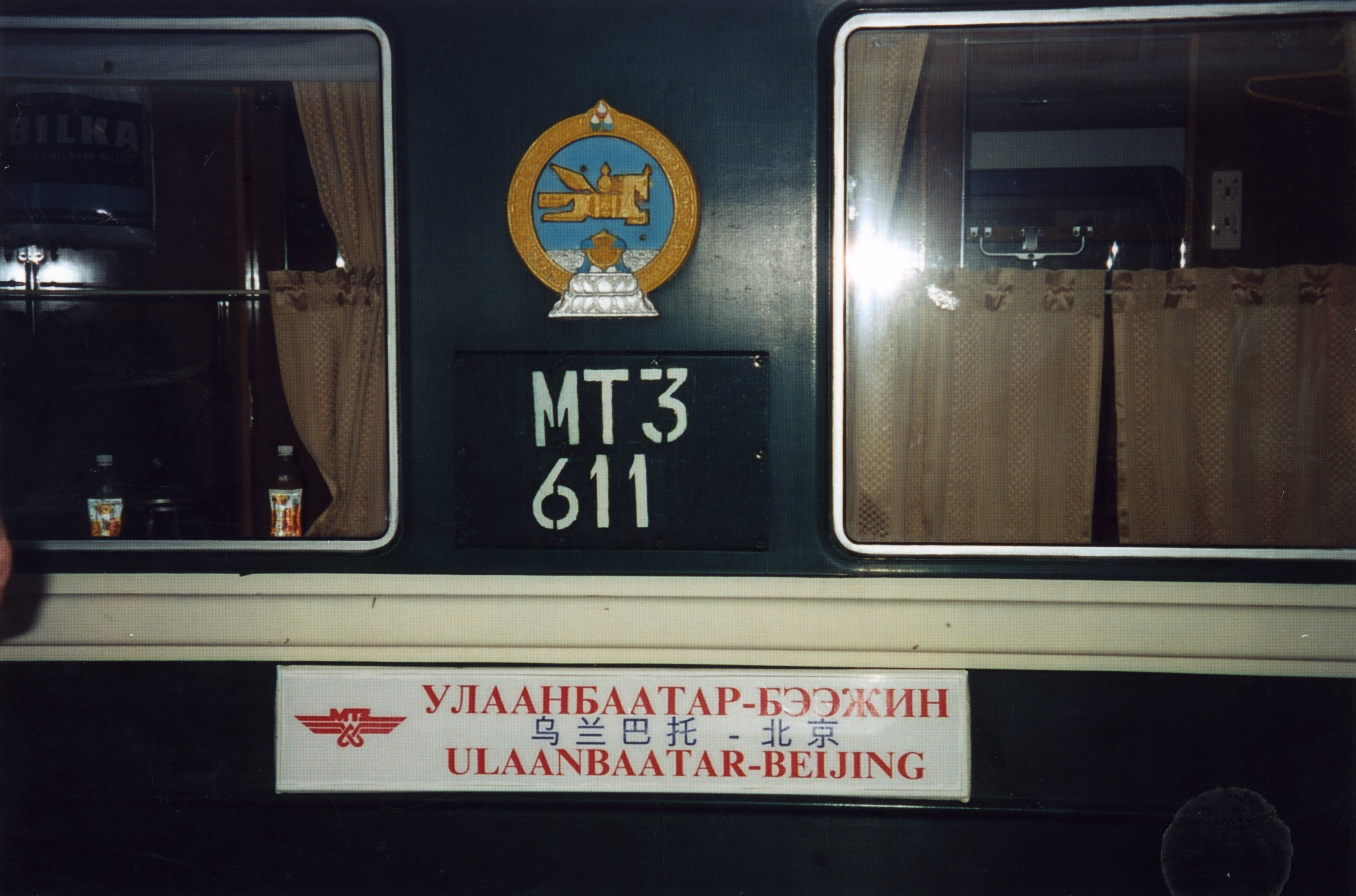 Train - Chine - Transsibérien